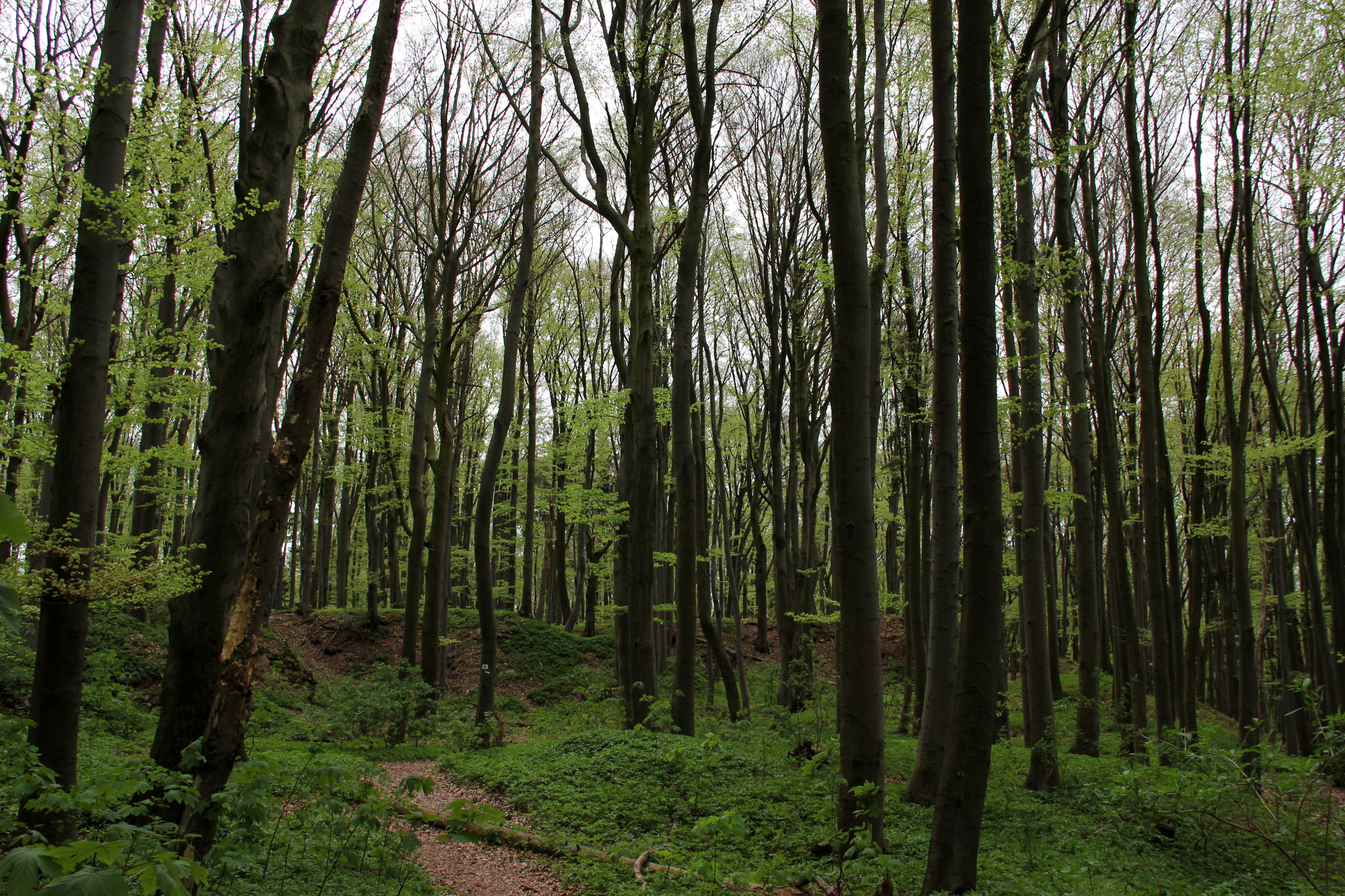 Schürfgruben